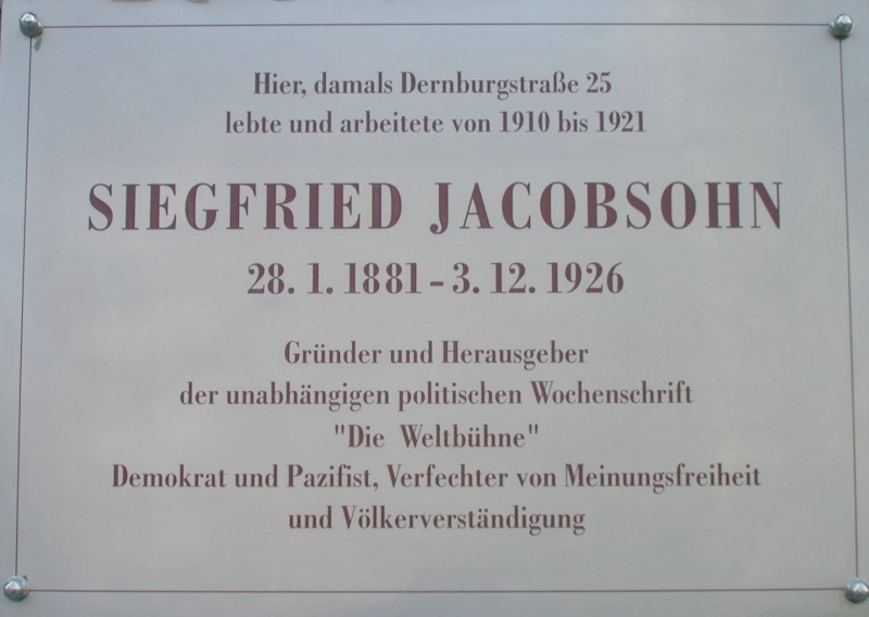 Gedenktafel für Siegfried Jacobsohn in Berlin. Charlottenburg. Eigene Aufnahme. 2002. GNU-FDL.